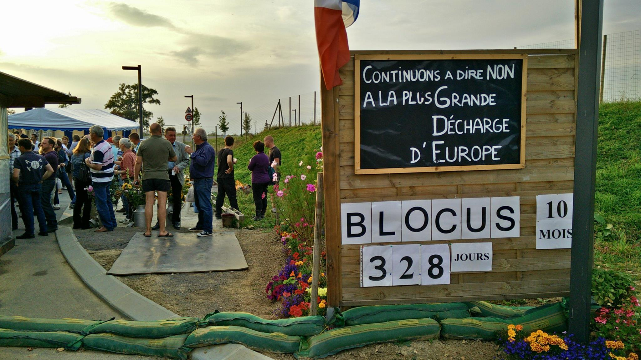 328e jour de blocus au centre d'enfouissement de Nonant-le-Pin